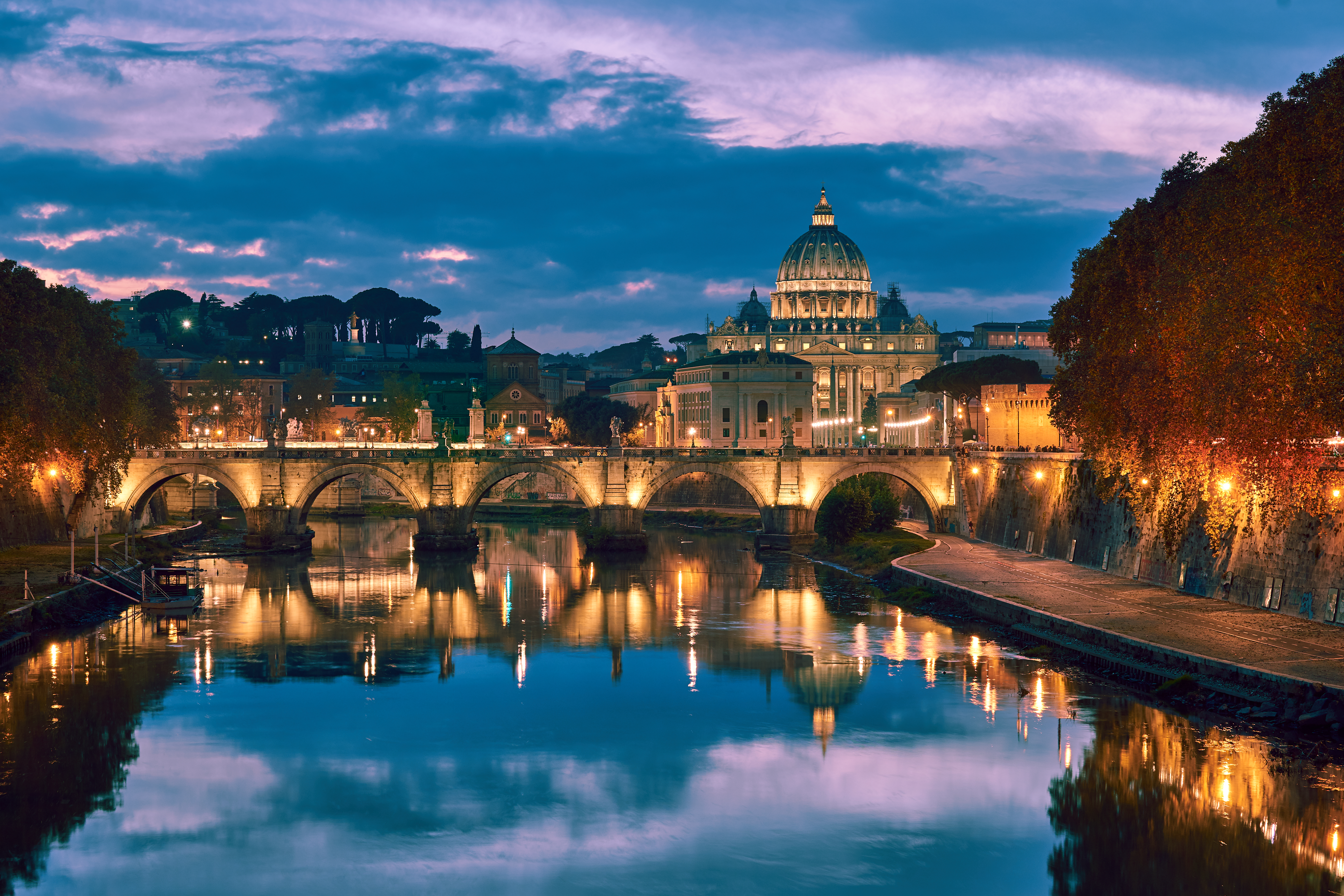 St. Angelo Bridge (Ponte Sant'Angelo) , Rome